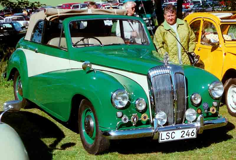 1954 Daimler Conquest Century Drophead Coupé